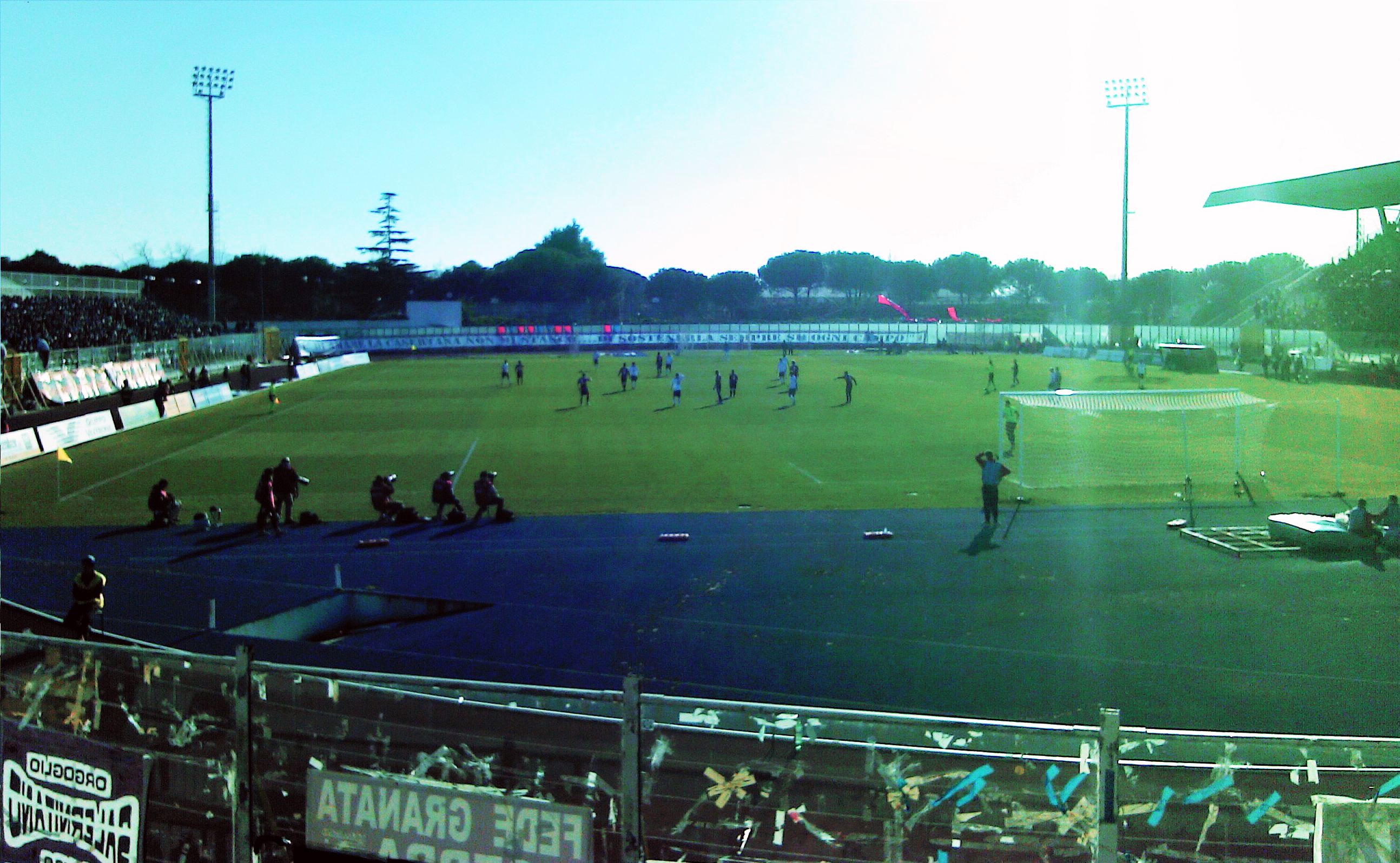 Dal settore ospiti, veduta dell'incontro disputato a Caserta tra la principale squadra locale contro la compagine della Salernitana, per una gara valevole per la Lega Pro 2014-2015.